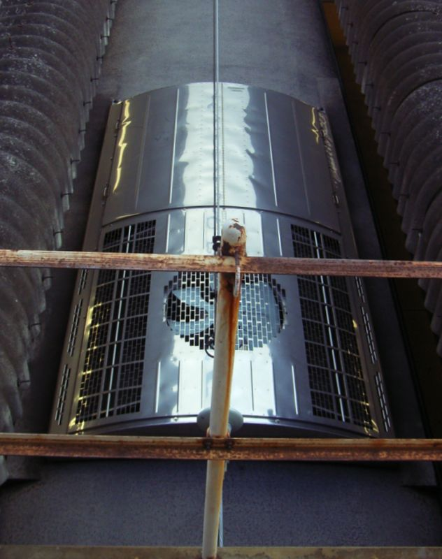 JR西日本103系体質改善40N試作車のAU720形風冷房機を上から。本来の冷房機より小さいため、ランボードの長さと一致していない